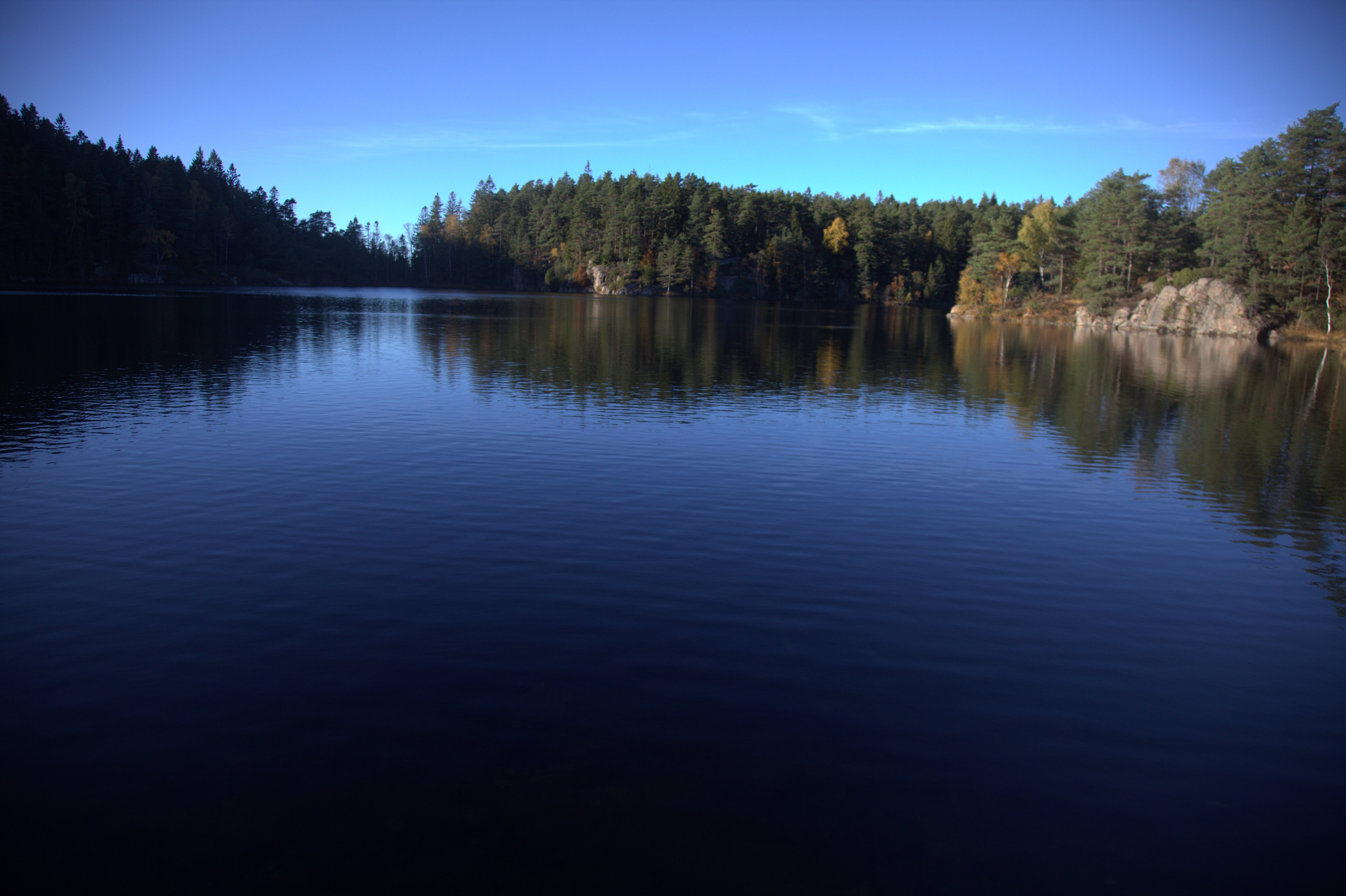 Stora Nöjevatten i Kungälvs kommun